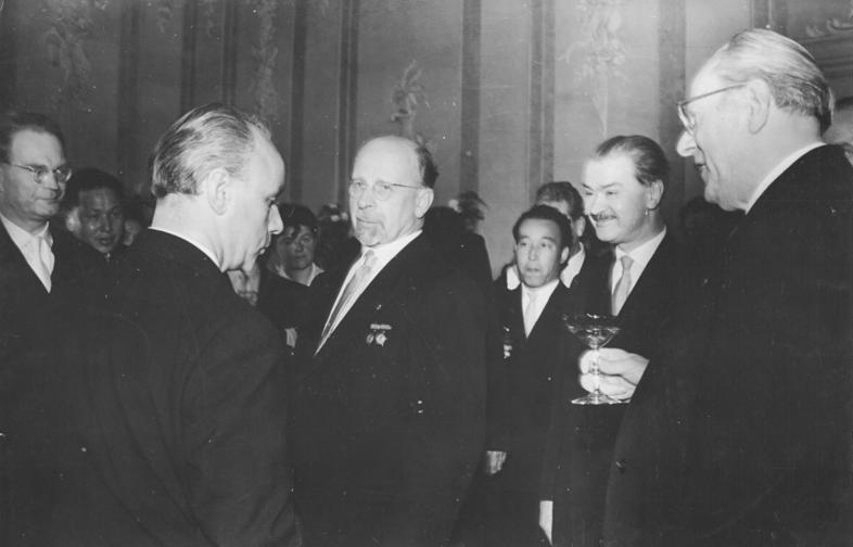 Zentralbild Zühlsdorf 26.9.1960 Walter Ulbricht empfing Diplomatisches Korps. Der Vorsitzende des Staatsrates der Deutschen Demokratischen Republik, Walter Ulbricht, empfing am 26.9.1960 im Amtssitz des Staatsrates in Berlin-Niederschönhausen das Diplomatische Korps. Erschienen waren die in der Deutschen Demokratischen Republik akkreditierten Diplomatischen Vertreter sowie die Leiter der Handelsvertretungen der Vereinigten Arabischen Republik und der Republik Finnland unter Leitung des amtierenden Doyen, CSSR-Botschafter Otto Klicka. UBz: Nach der Erklärung Walter Ulbrichts: Von rechts nach links: Der Vorsitzende des Ministerrates, Otto Grotewohl; der Stellvertreter des Ministers für Auswärtige Angelegenheiten, Sepp Schwab; der Vorsitzende des Staatsrates, Walter Ulbricht; der Ausserordentliche und Bevollmächtigte Botschafter der CSSR, Otto Klicka und der Ausserordentliche und Bevollmächtigte Botschafter der UdSSR, M.G. Perwuchin.